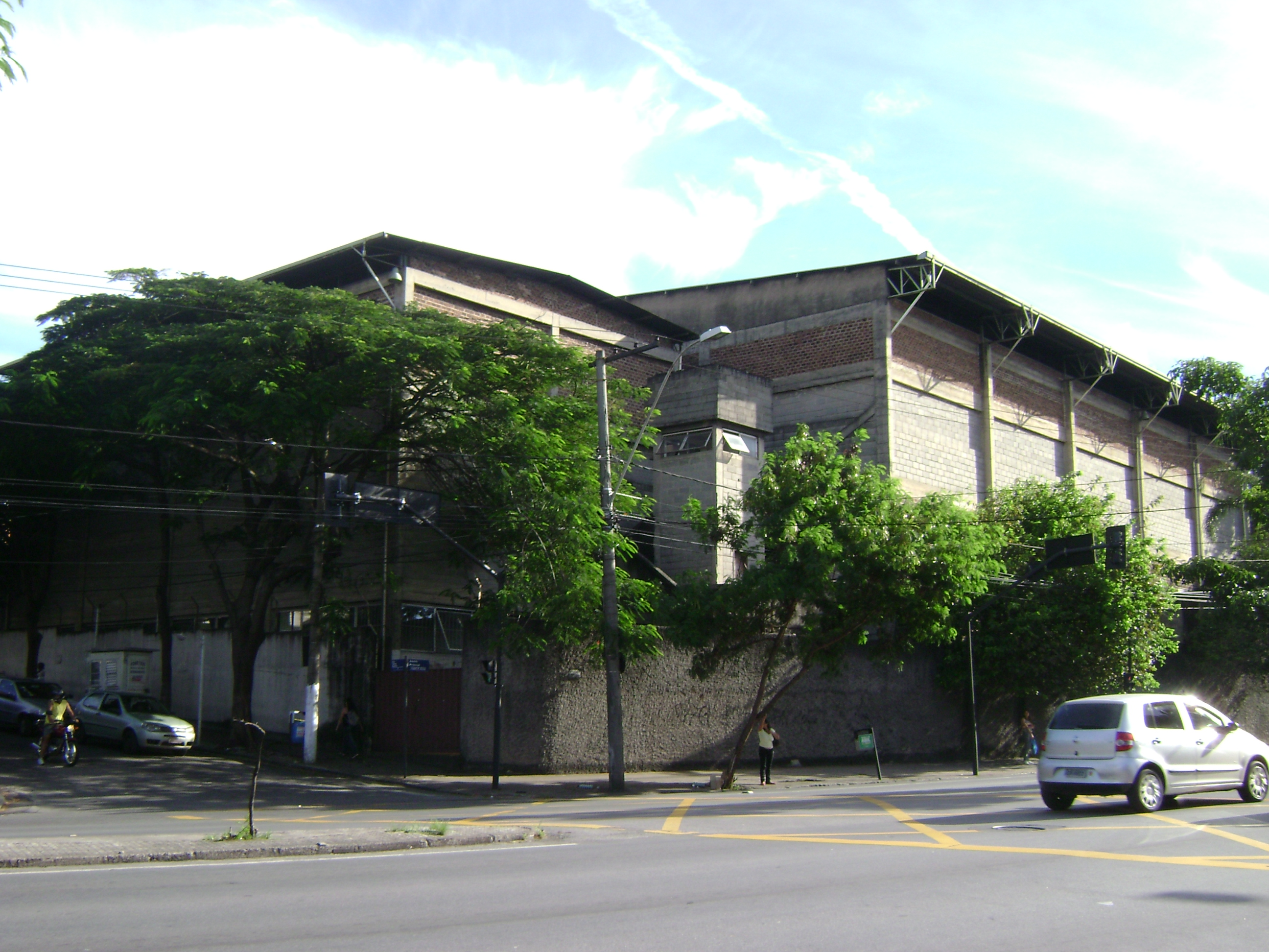 Torre rodeada de árvores no campus I do Cefet-MG.